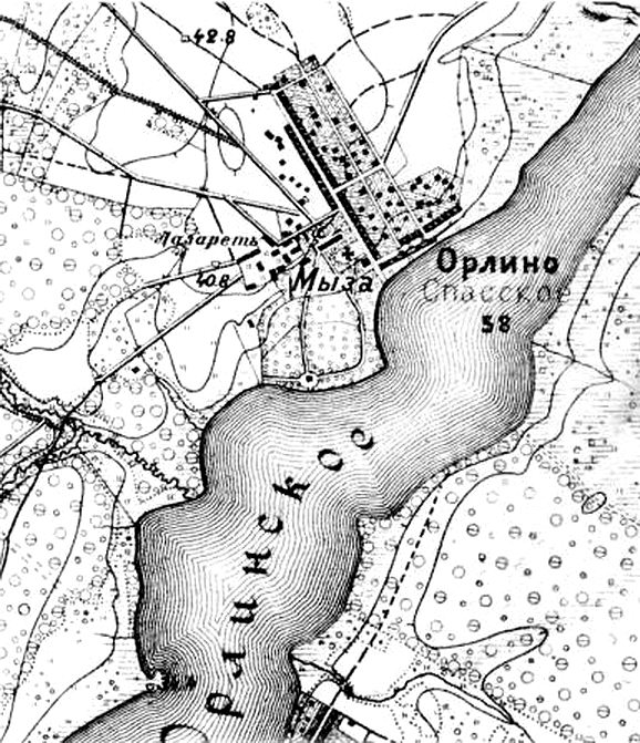 План деревни Орлино на карте 1892 года.